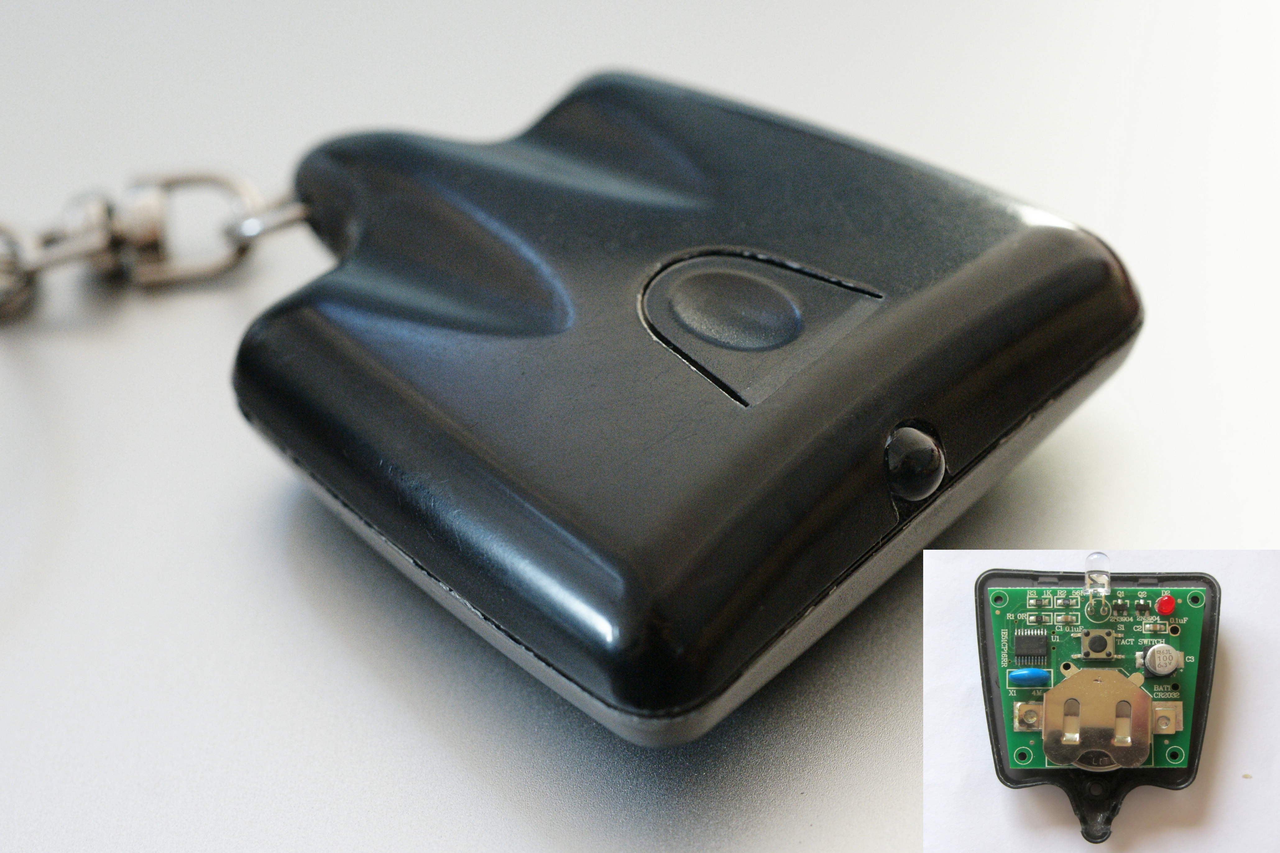 Kombination aus File:TV-B-Gone opened.jpg und File:TV-B-Gone.jpg by Alexander Klink